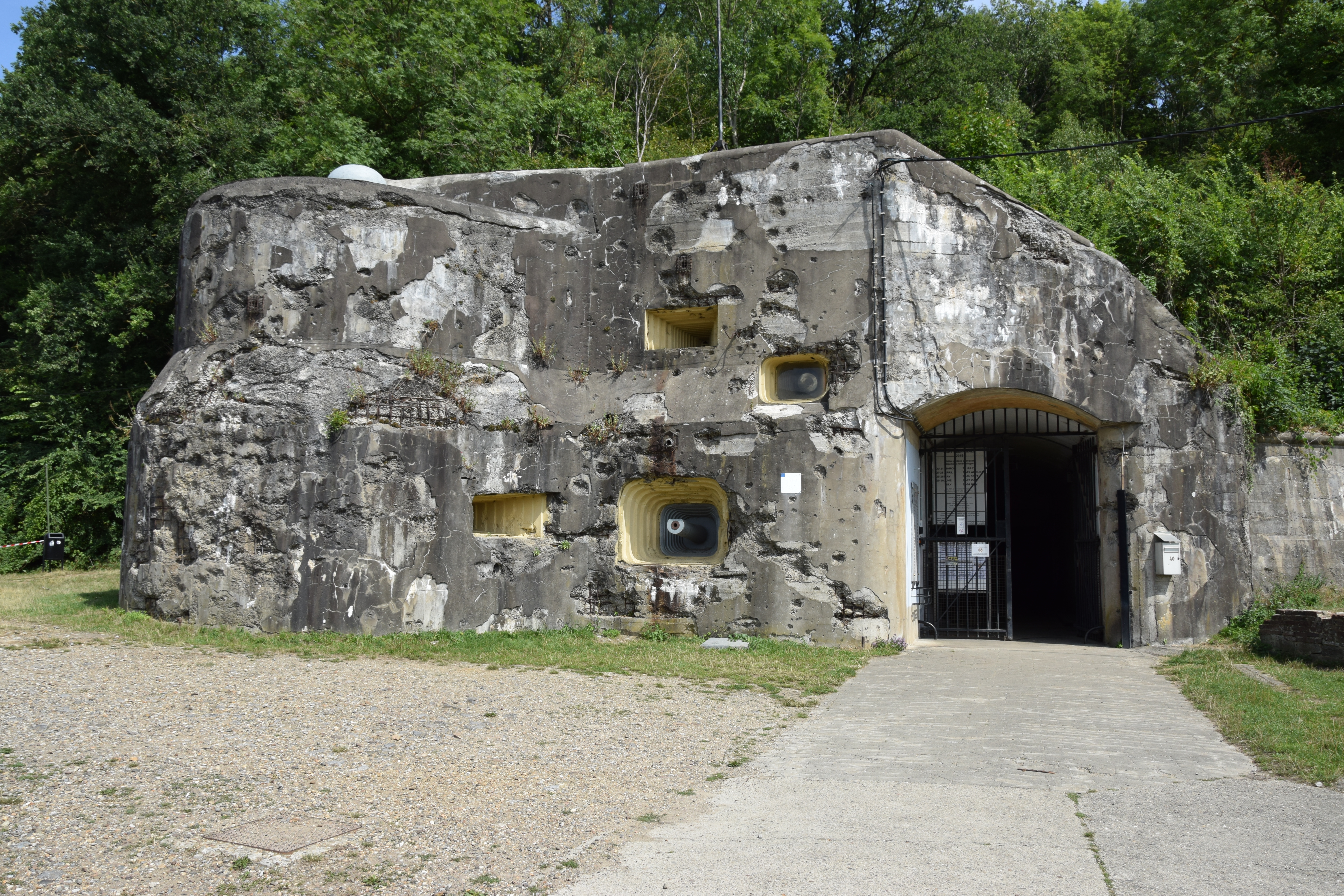 Vue du fort d'Eben-Emael, entre Liège et Maastricht (commune de Bassenge, province de Liège en Belgique).